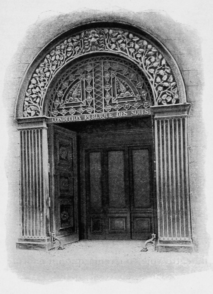 Dictionnaire illustré des communes du département du Rhône. Tome 2 / par MM. E. de Rolland et D. Clouzet.